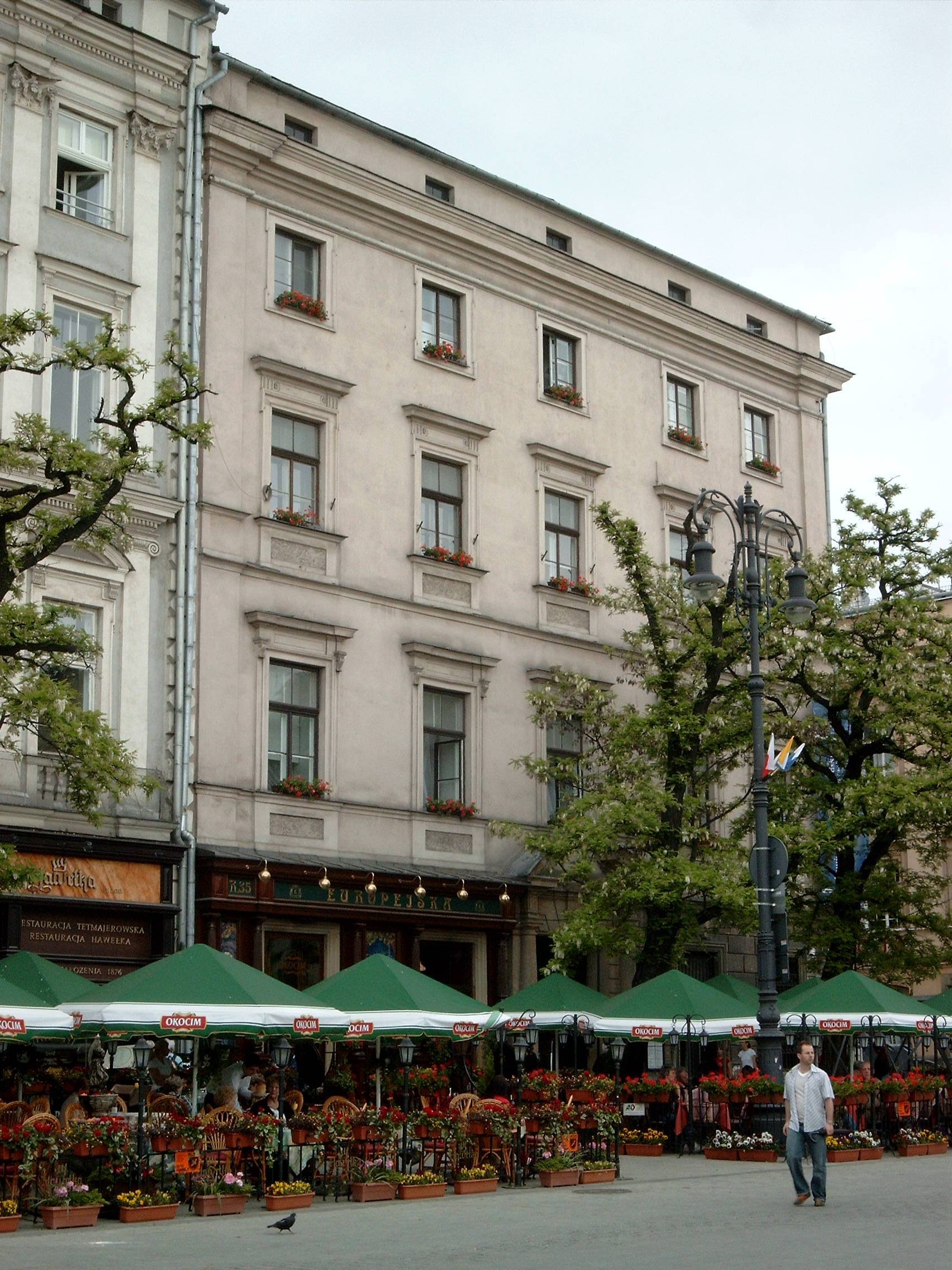 Krzysztofory - siedziba Muzeum Historycznego Miasta Krakowa